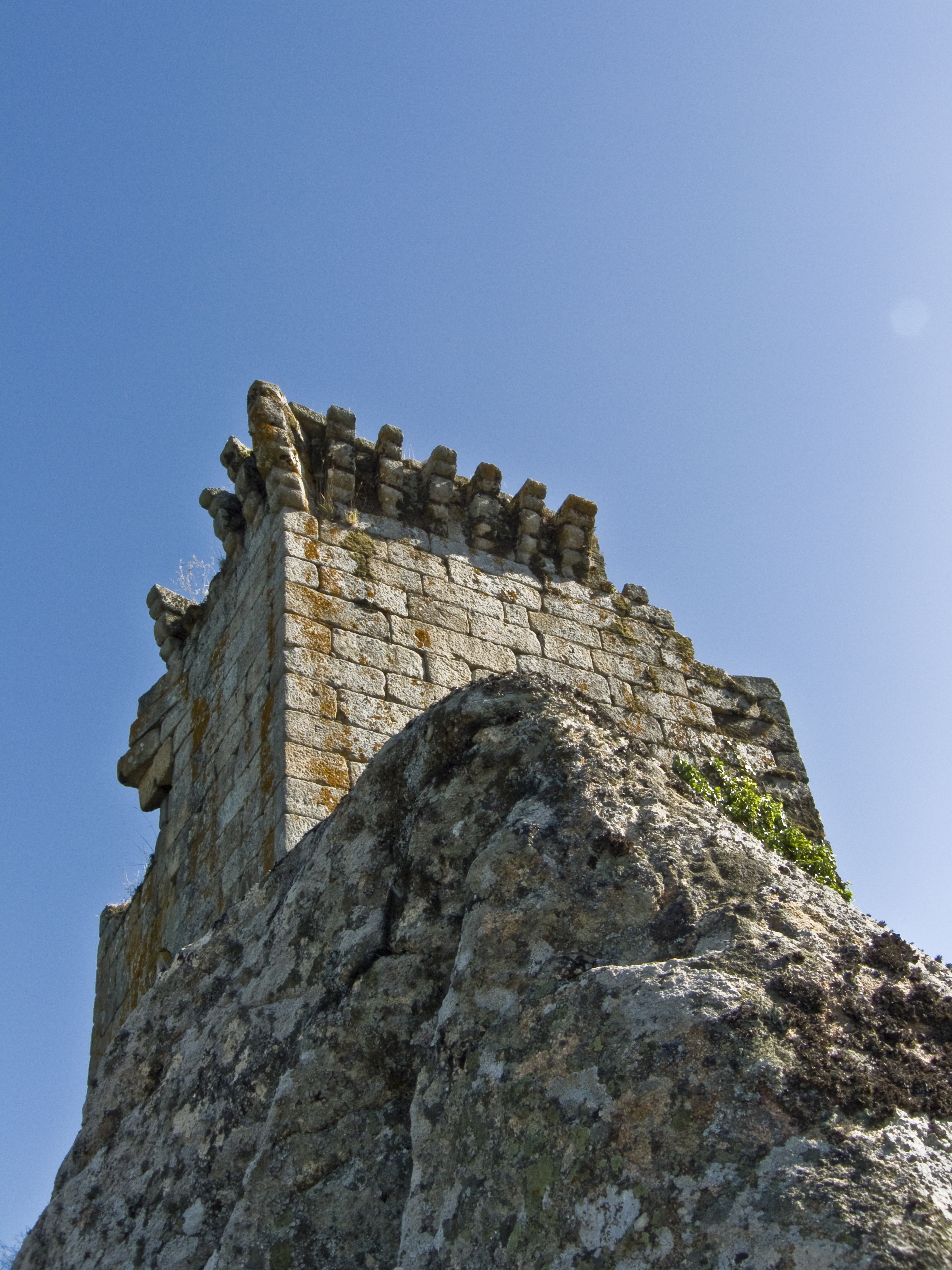 Torre de Sande, Cartelle, Ourense